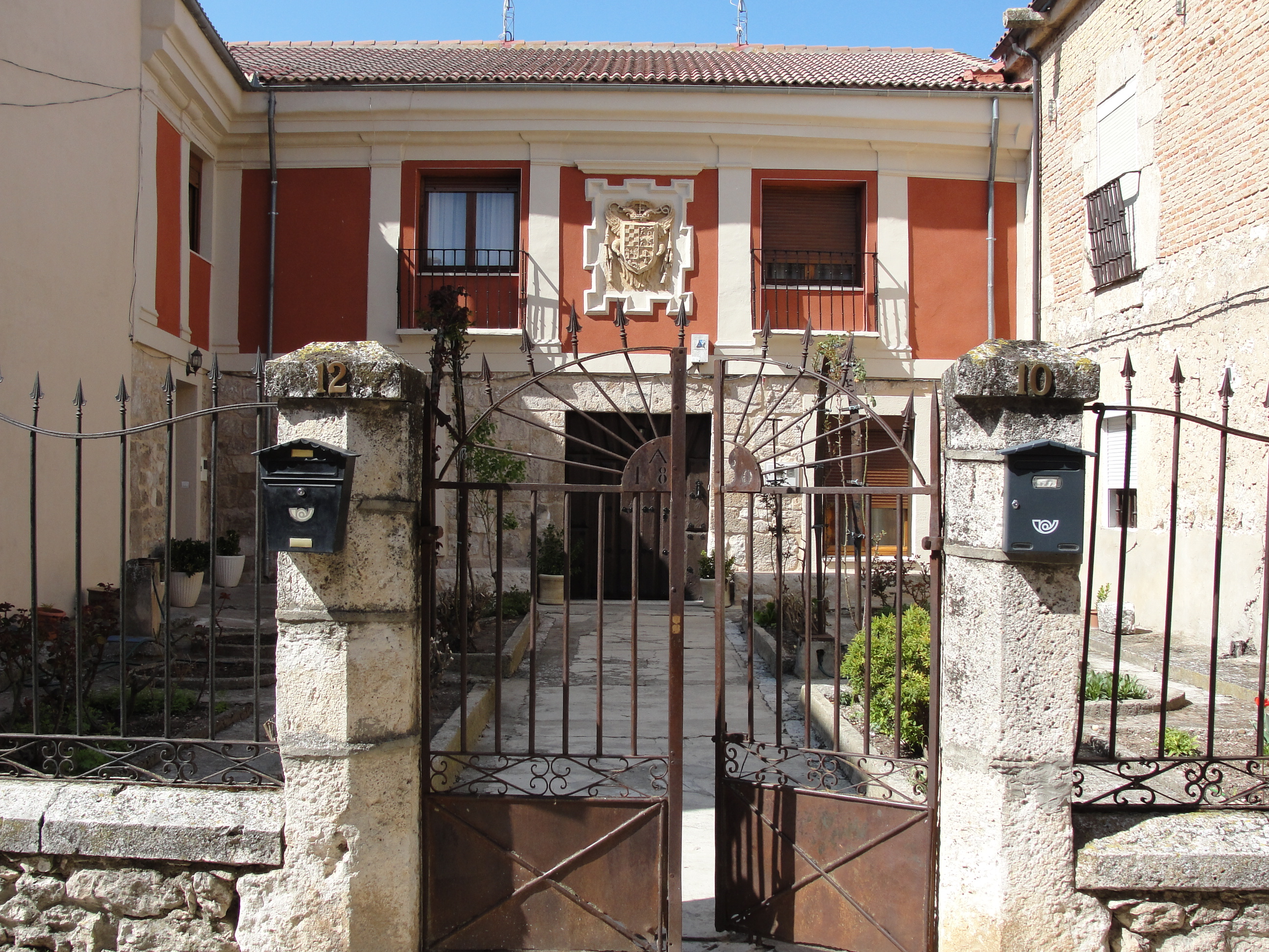 Casa noble siglo XVIII